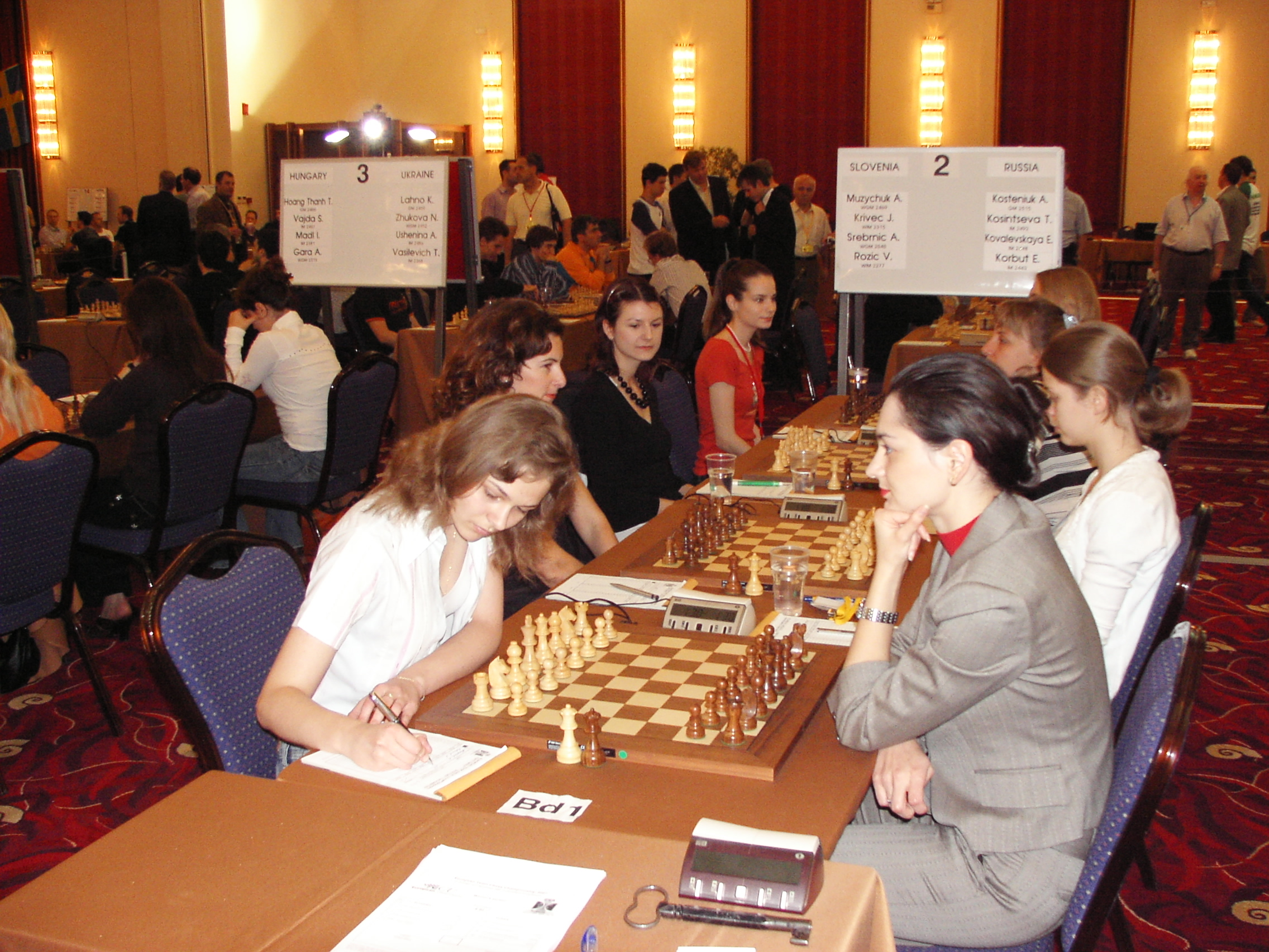 Slovenia-Russia